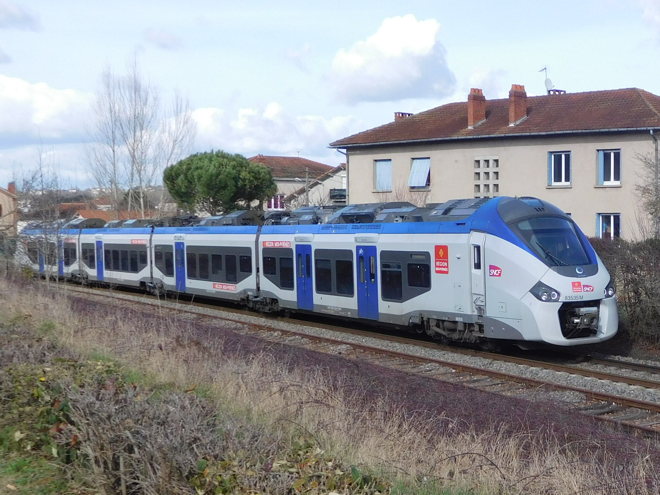 Un Régiolis partant de la gare de Carmaux (81).